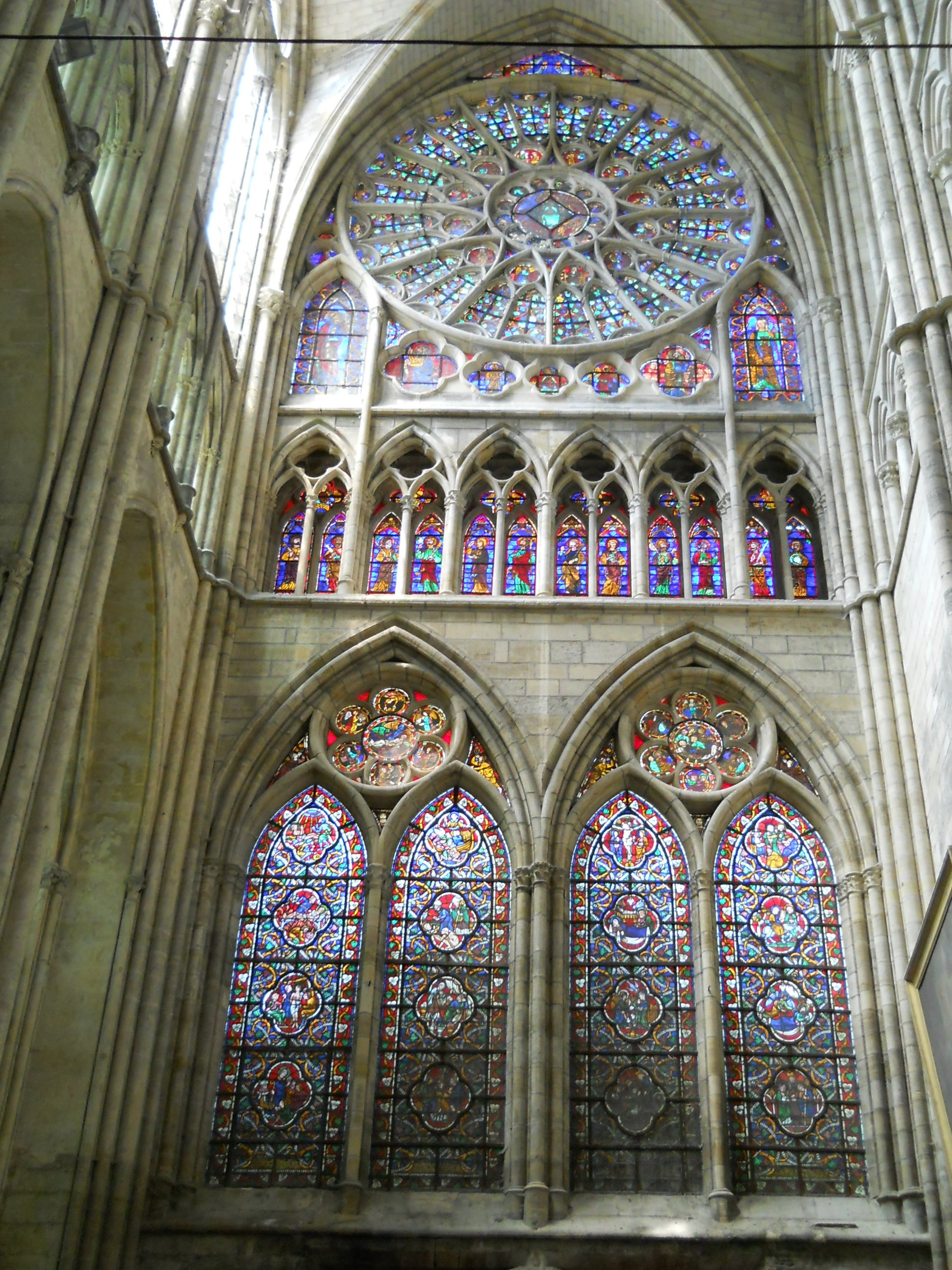 Châlons-en-Champagne, Kathedrale St-Etienne, Stirnwand der nördlichen Querschiffes